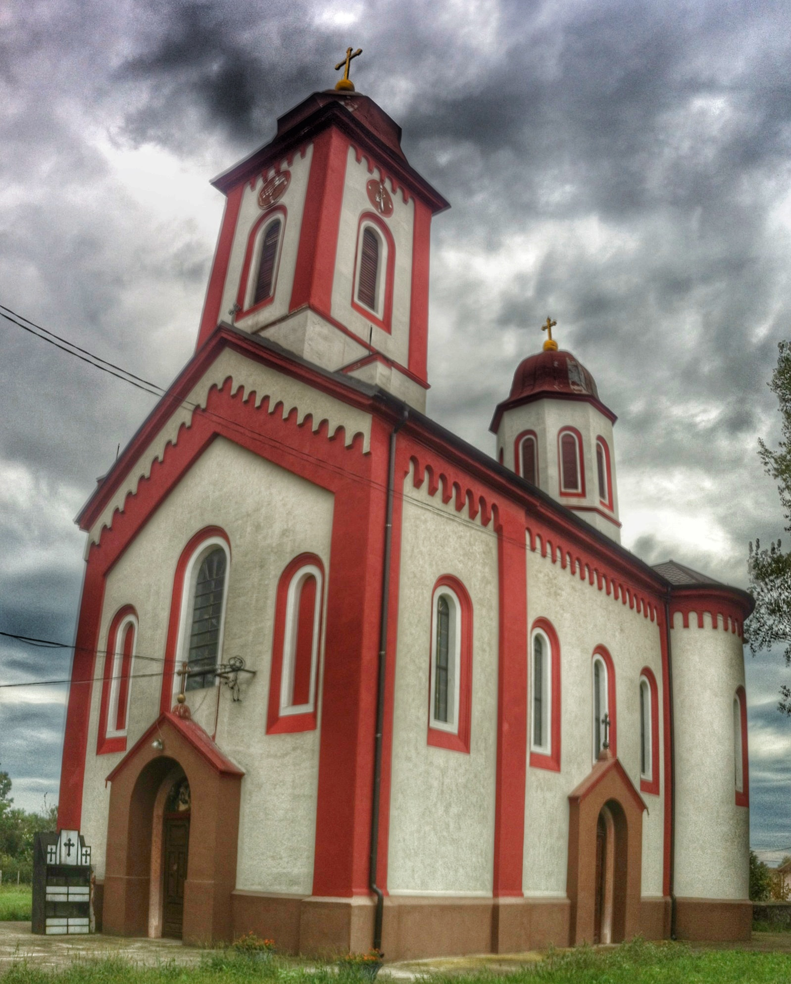 Српски (ћирилица): Црква се налази близу аутобуске станице у пространој порти.